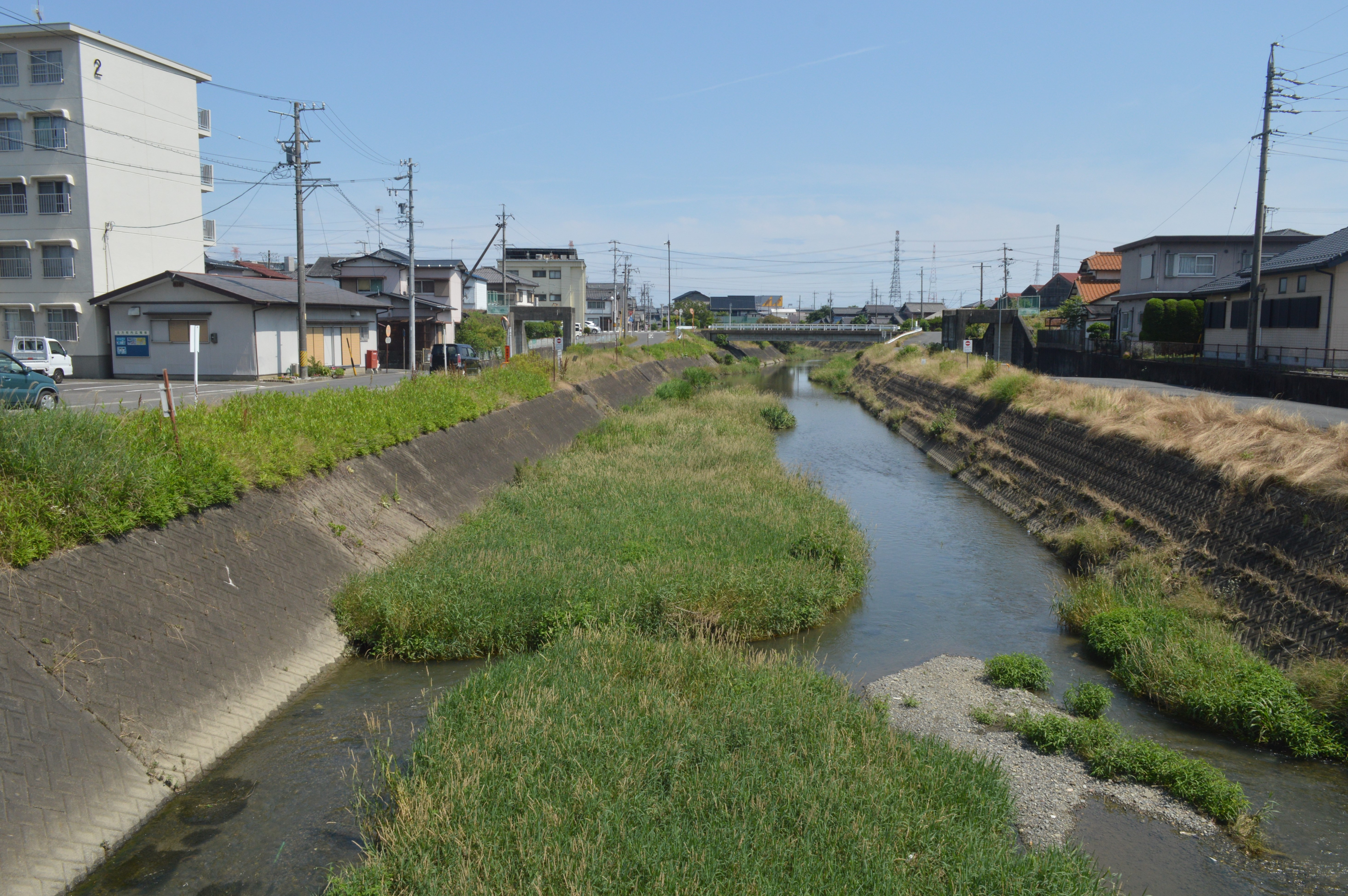 糸貫川。国道157号（岐阜県本巣市上真桑2258付近）から下流を向いて撮影。岐阜県本巣郡北方町と本巣市の境界となっている。